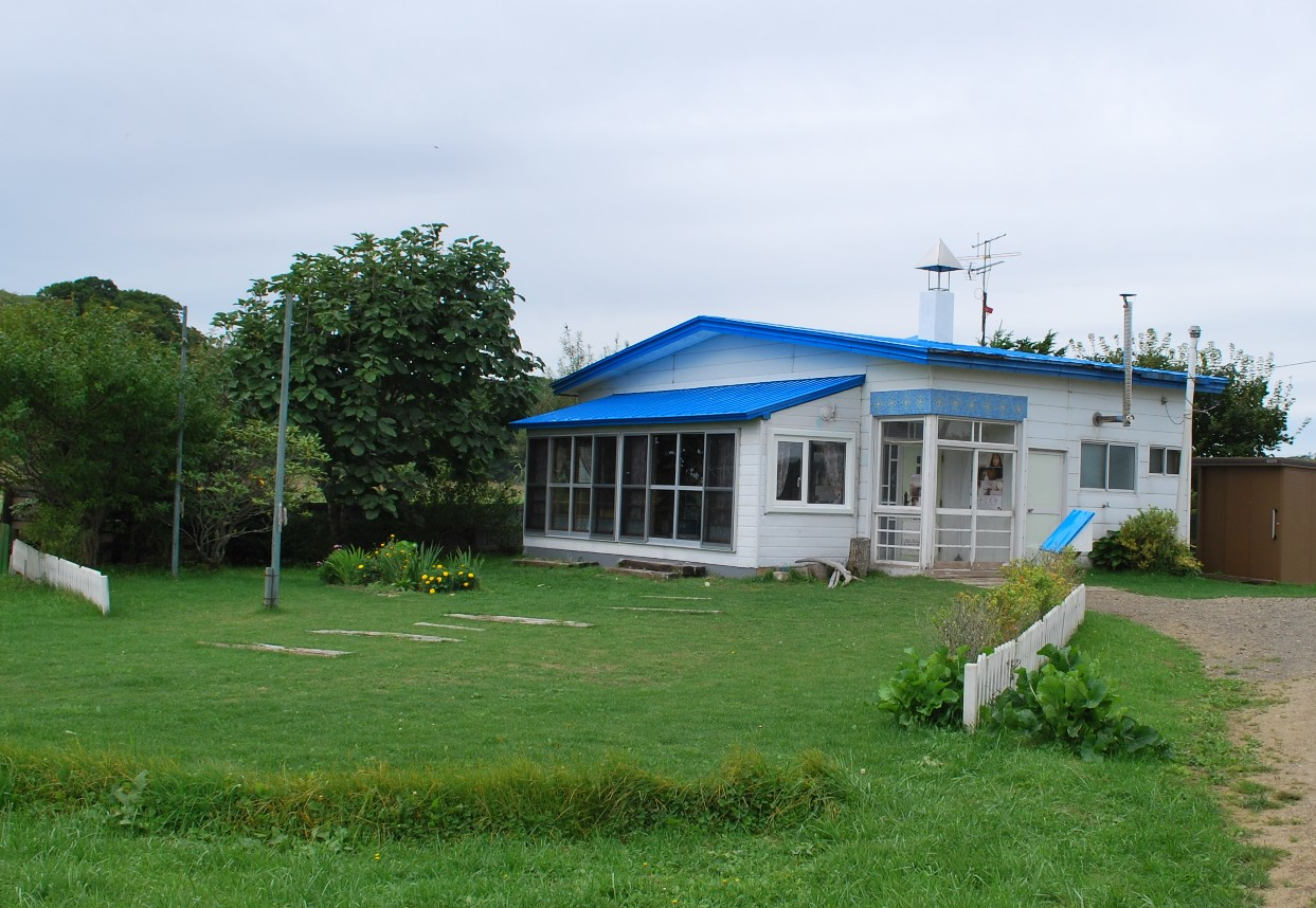 2010年夏公開の映画「ハナミズキ」の主人公紗季の家オープンセット。北海道釧路市音別町尺別に所在。